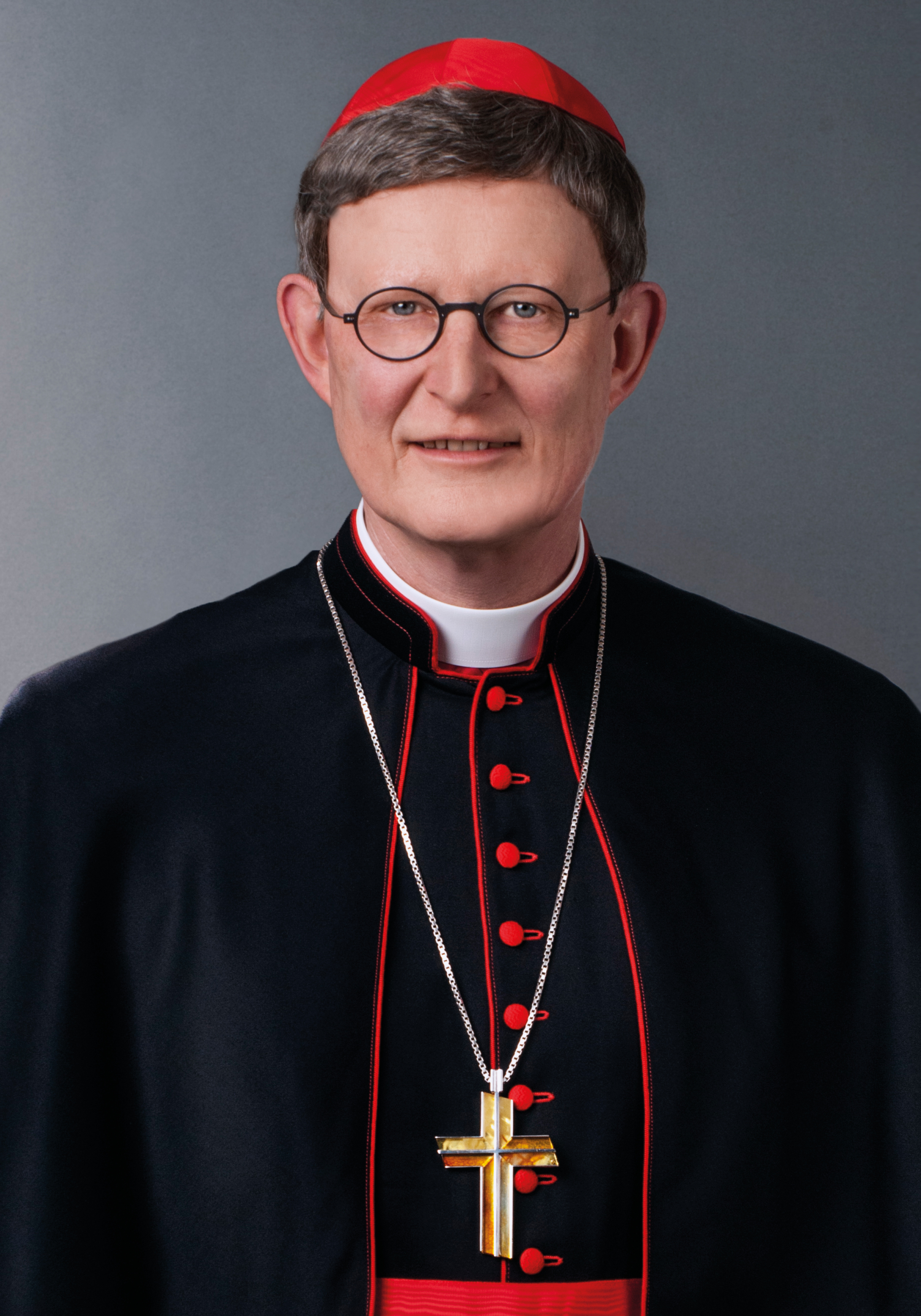 Rainer Maria Kardinal Woelki ist Erzbischof der römisch-katholischen Erzdiözese Köln.